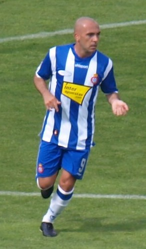 Iván de la Peña en el partido que enfrentó al RCD Español y al Málaga CF en el último partido de La Liga 2008/09 en el estadio Olímpico de Montjuic.